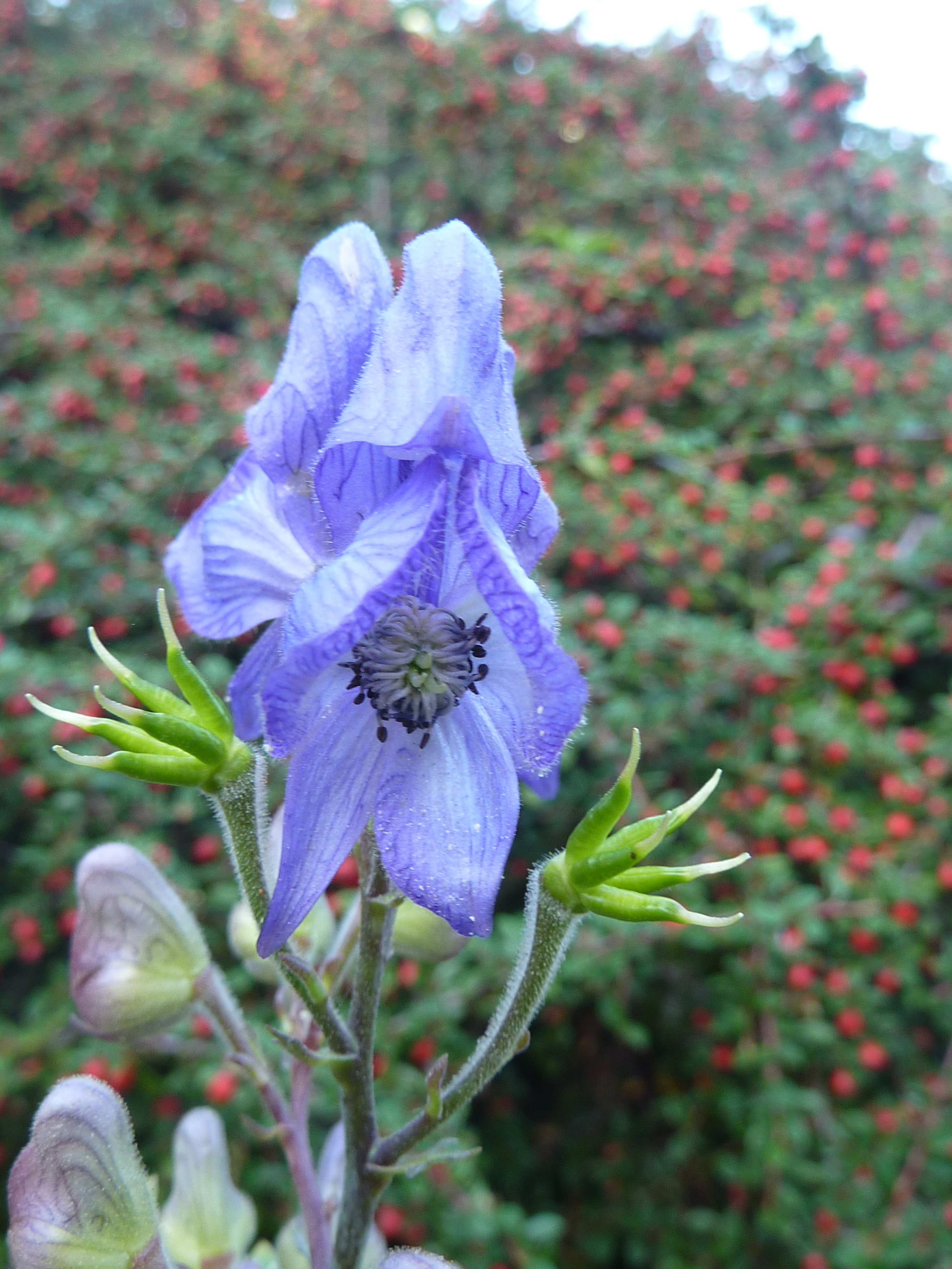 Aconitum uchiyamai